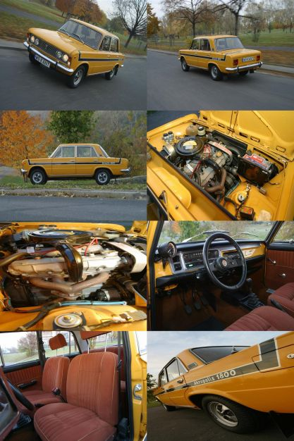 FIAT 125p AKROPOLIS 1800 (360'o)